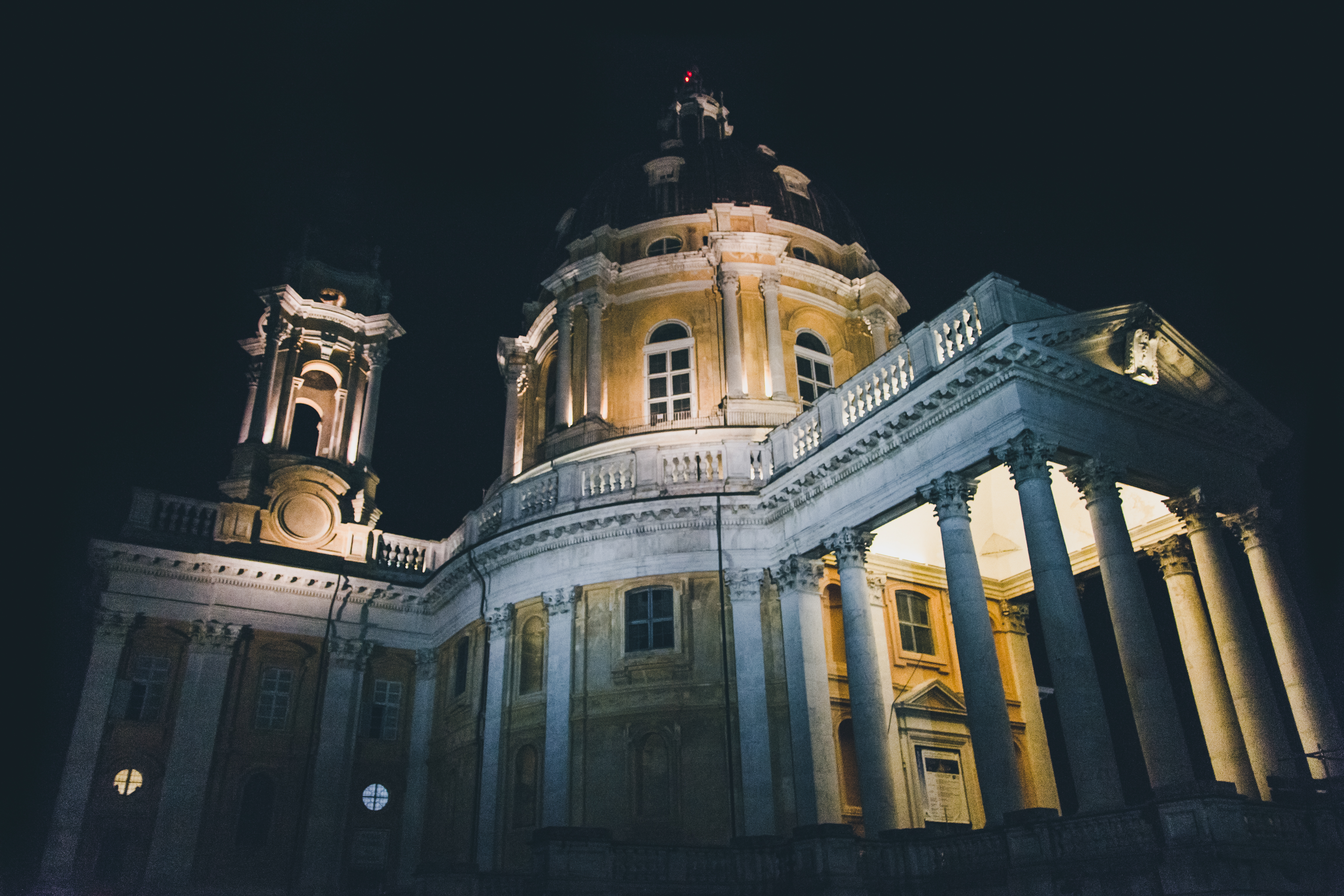 parco naturale della Collina di Superga (Q3895642)